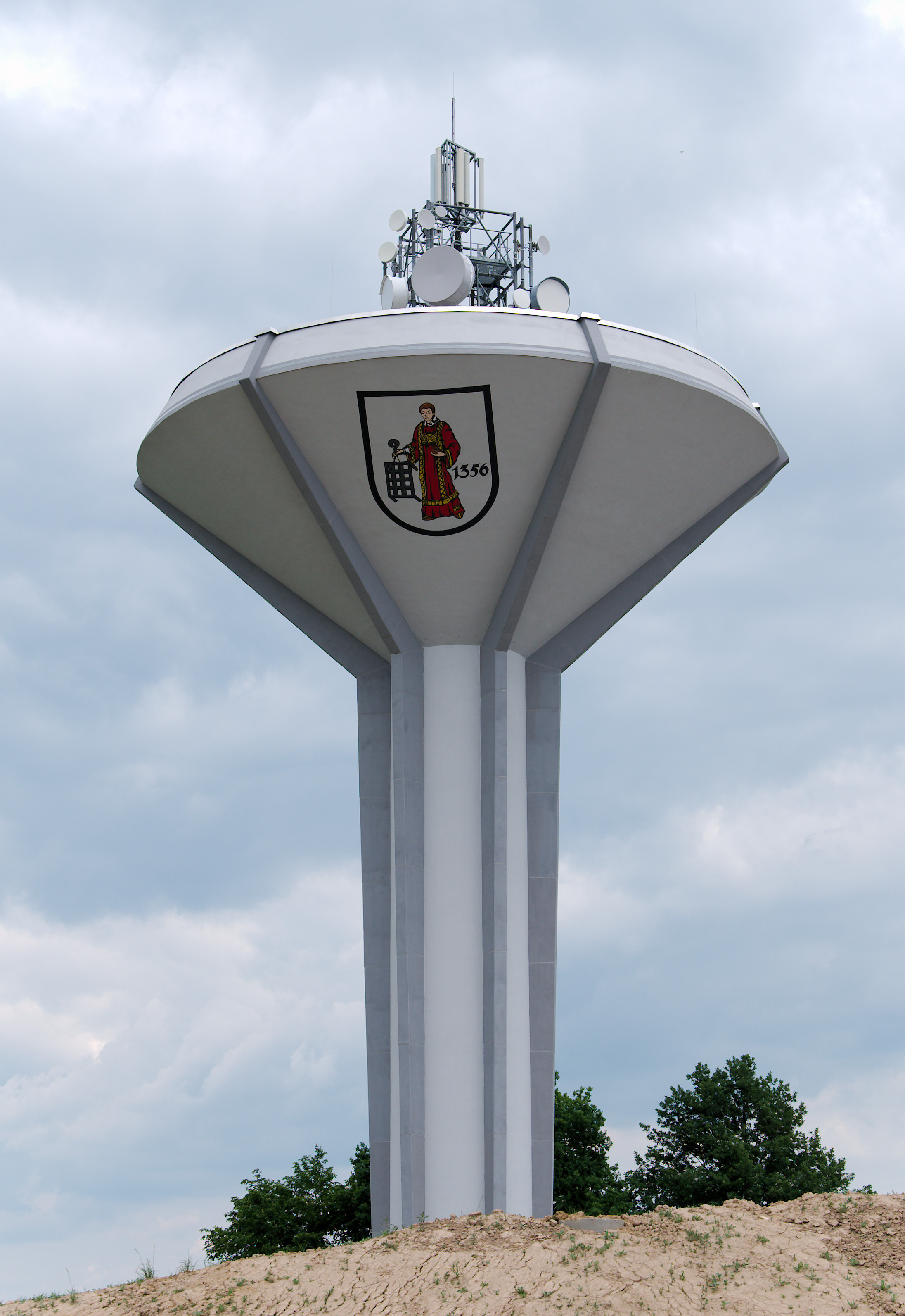 Wasserturm Niedernhall-Giebelheide mit Stadtwappen Niedernhalls